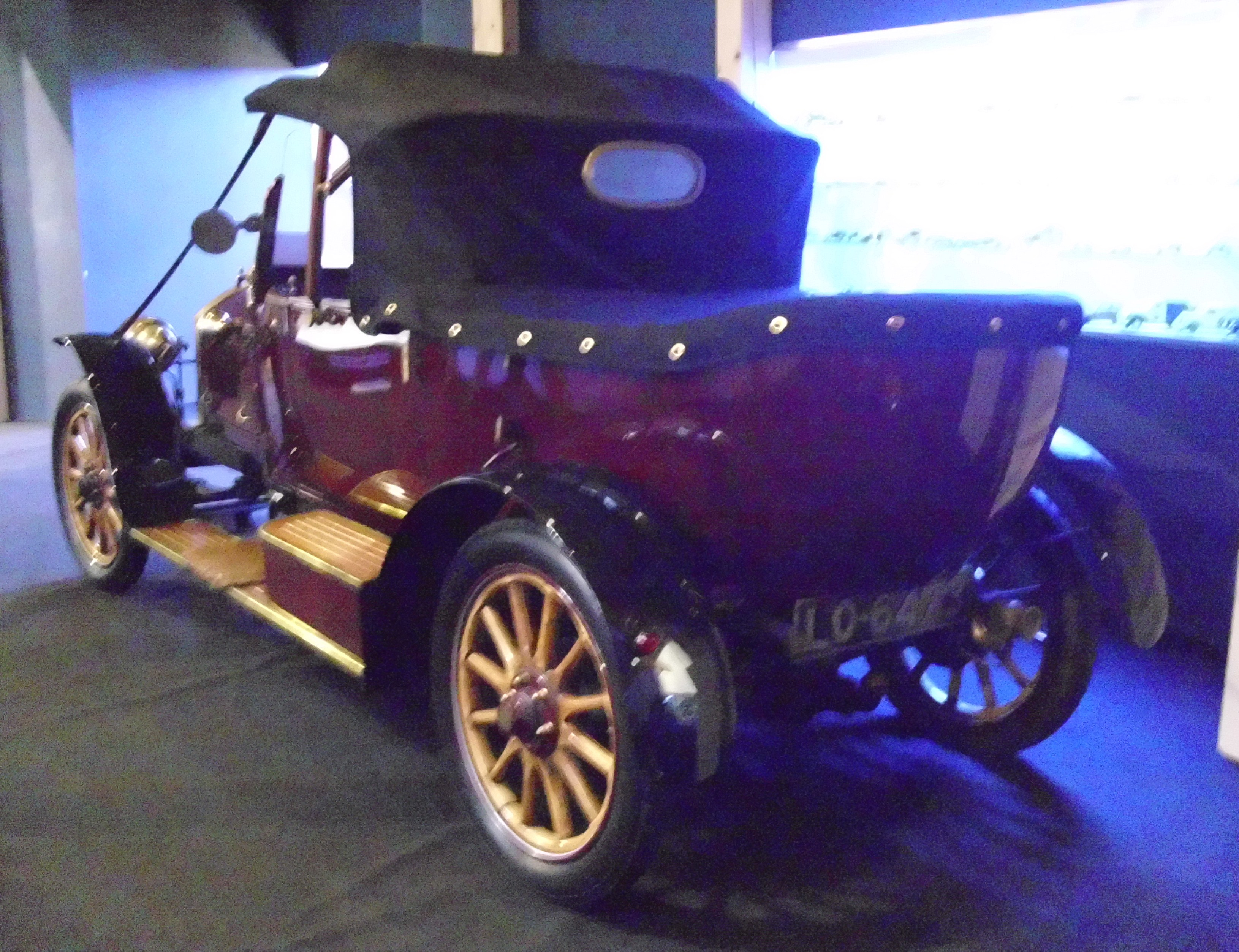 Waverley 1915 im Oldtimermuseum Koller Heldenberg